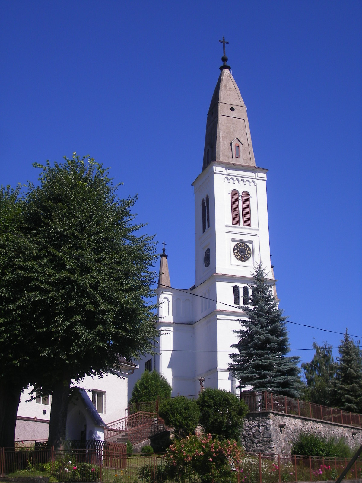 Hárskút - katolikus templom